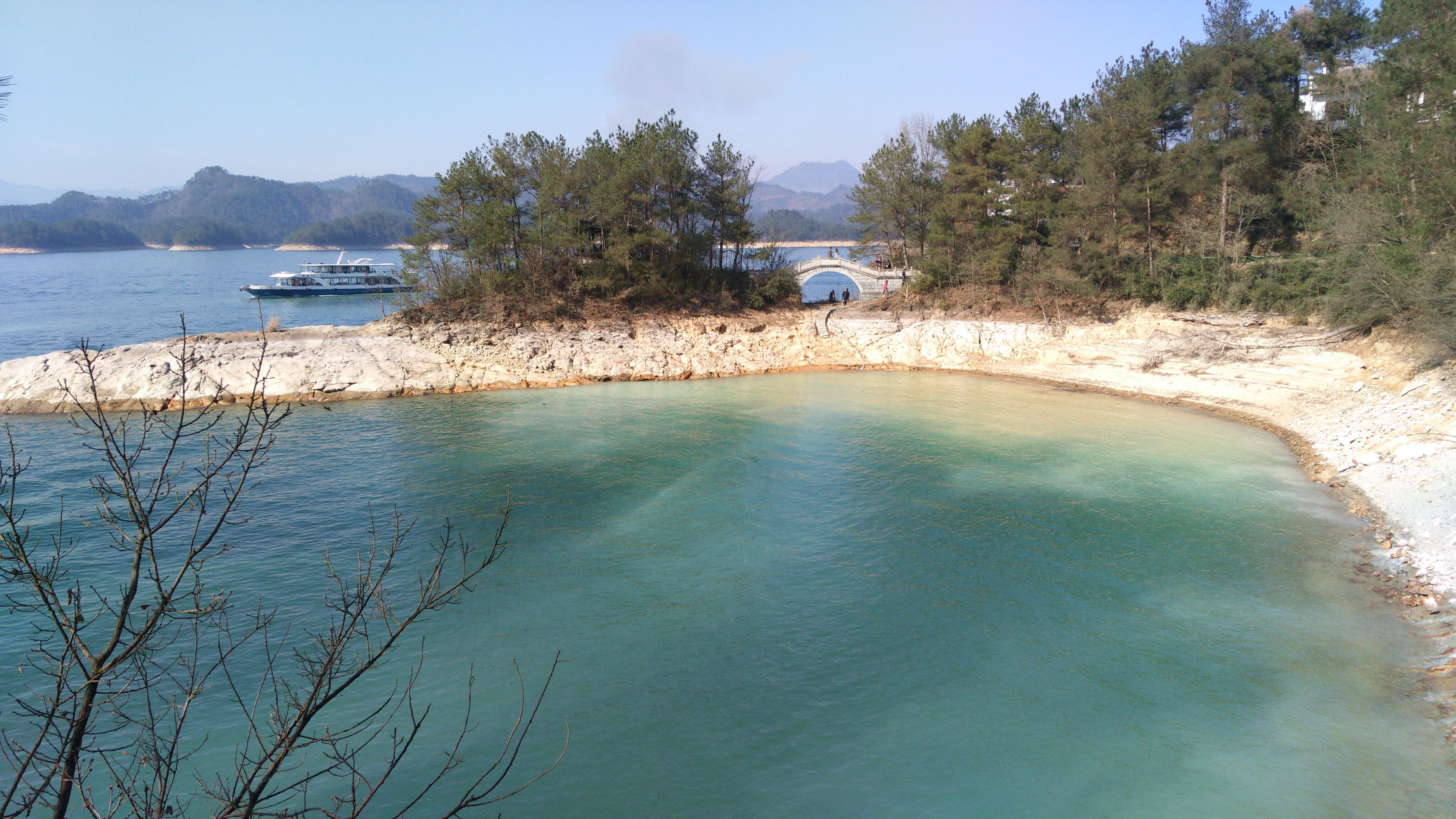 Chun'an, Hangzhou, Zhejiang, China